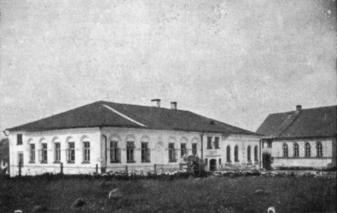 Беларуская (тарашкевіца): Зьдзецел (Ździecieł). Сынагога